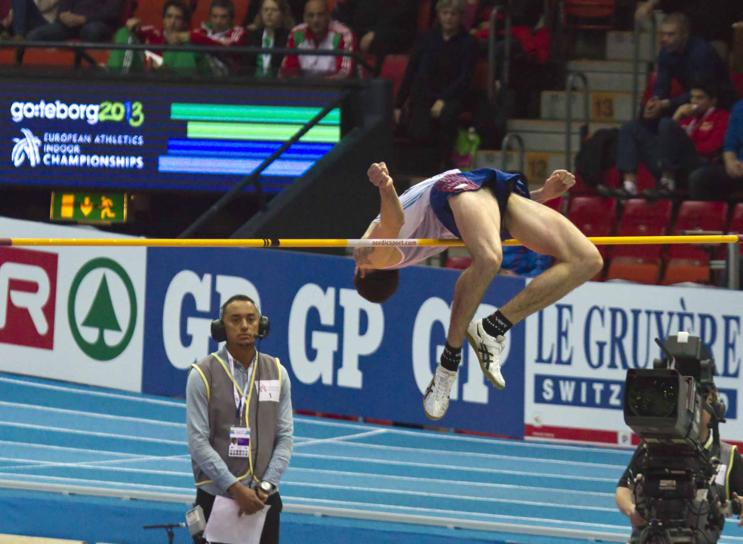 339 baba